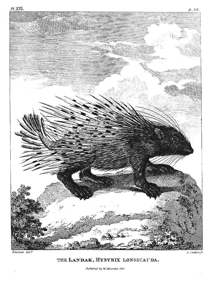 William Marsden: The History of Sumatra. Tafel XVII: Landak